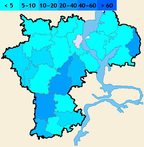 Erzya in Ulyanovsk Oblast